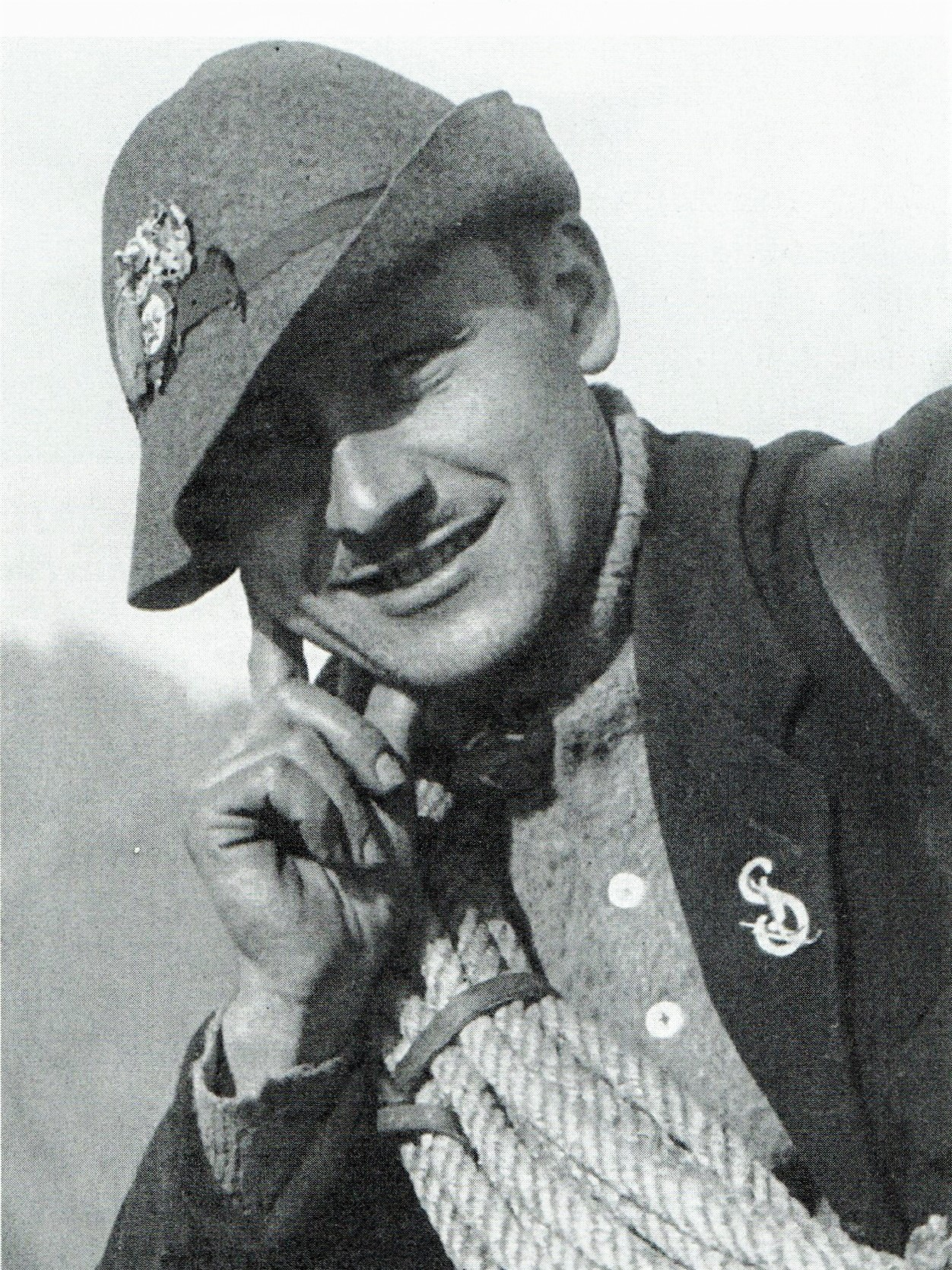 Zakladateľ horolezeckého spolku JAMES Mikuláš Mlynarčík . * 6.12.1894 Tatranská Kotlina . + 5.11.1977 Žilina, Slovakia